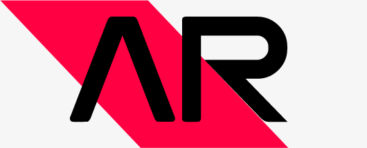 AssolutoRacingのアプリアイコンに使用されているロゴ